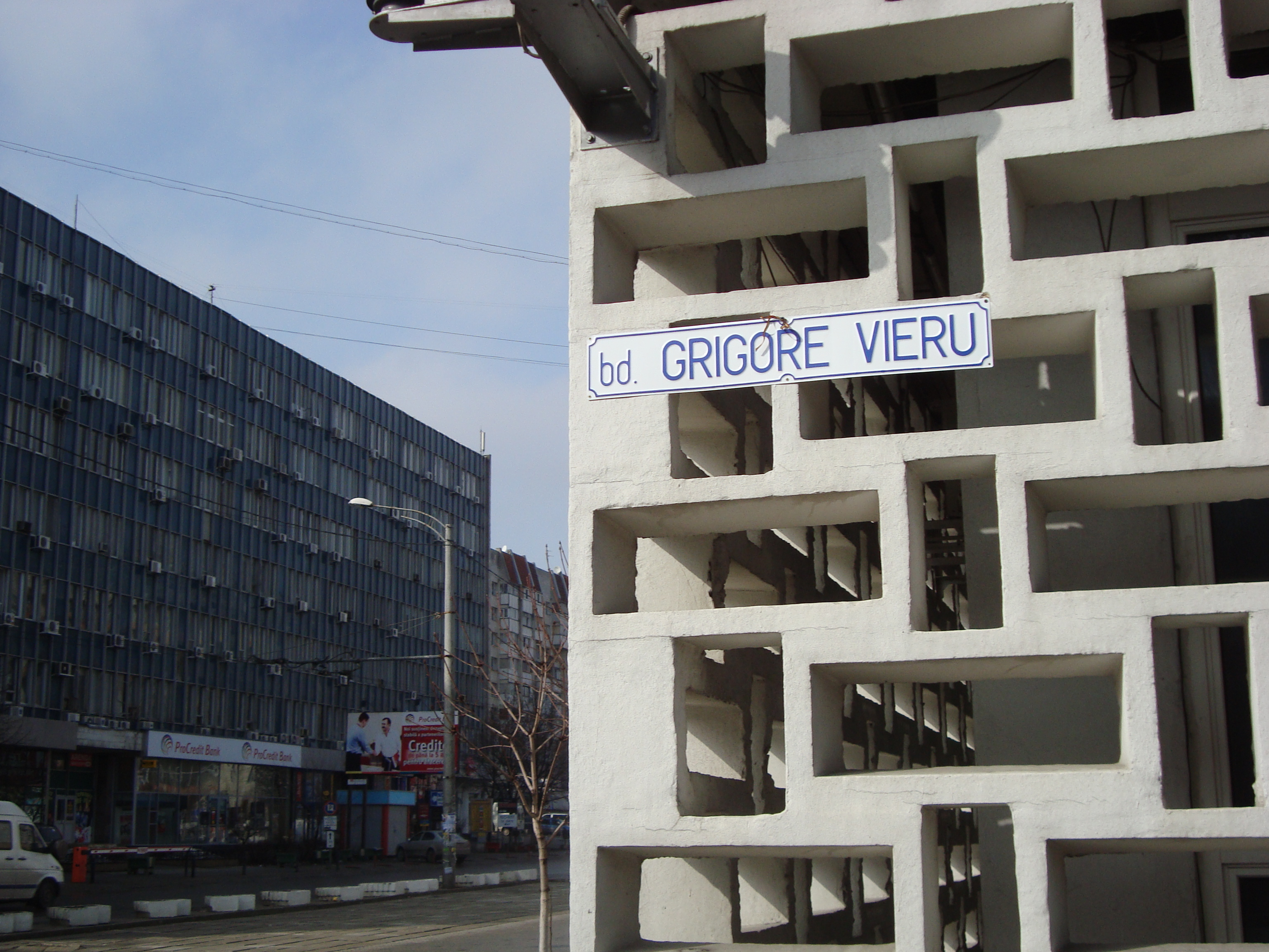 Plăcuță de pe Bd. Grigore Vieru din Chișinău